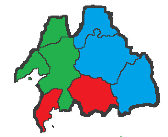 Alcaldes de la Comarca de Pontevedra.